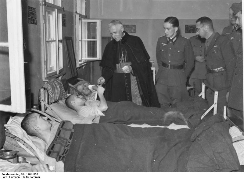 Päpstlicher Nuntius besucht Kriegsgefangenenlager Der päpstliche Nuntius in Berlin, Msgr. Orsenigo, besuchte ein Kriegsgefangenenlager, wo er den Insassen die Heilige Kommunion erteilt. UBz.: In der Krankstation des Kriegsgefangenenlager verteilt der päpstliche Nuntius gesegnete Heiligenbilder an die Kranken.